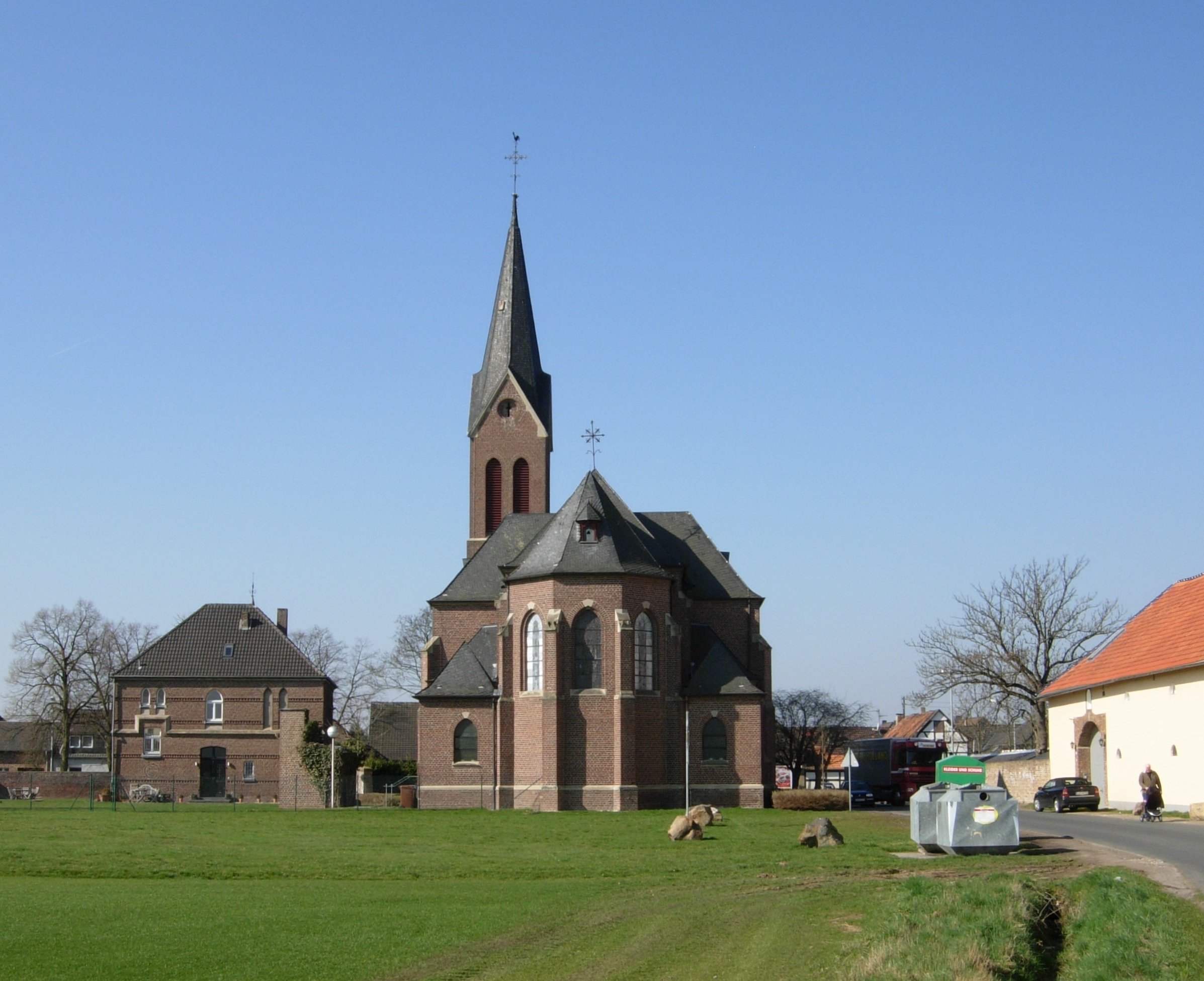 Katholische Laurentius-Kirche in Müggenhausen (Weilerswist) von Osten; rechts ein Gebäude, das zur Pferdeklinik Burg Müggenhausen gehört (auf dem Gelände der ehemaligen Burg)